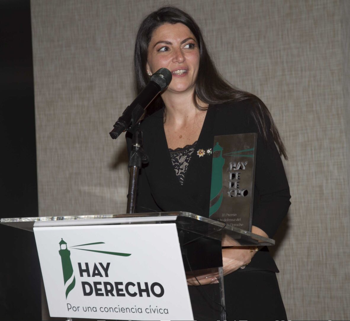 Olona recibió en la gala anual de este colectivo el galardón por su trabajo contra la corrupción y en defensa del Estado de Derecho en el País Vasco.